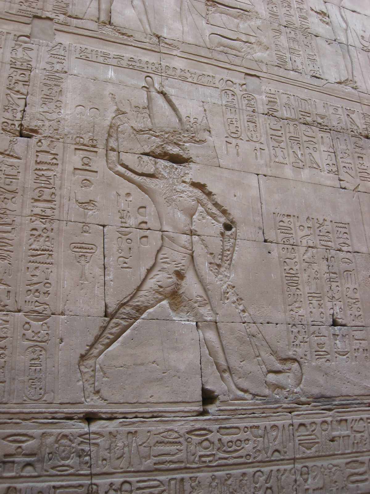 Ptolemy VIII. IMG_7148